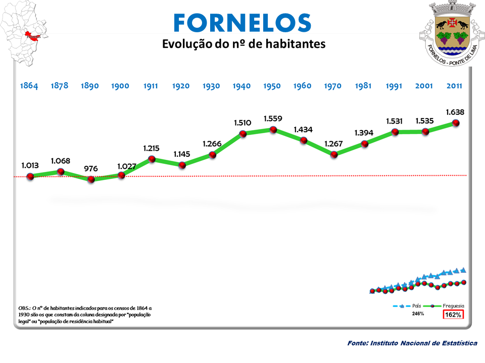 Cenos 1864/2011